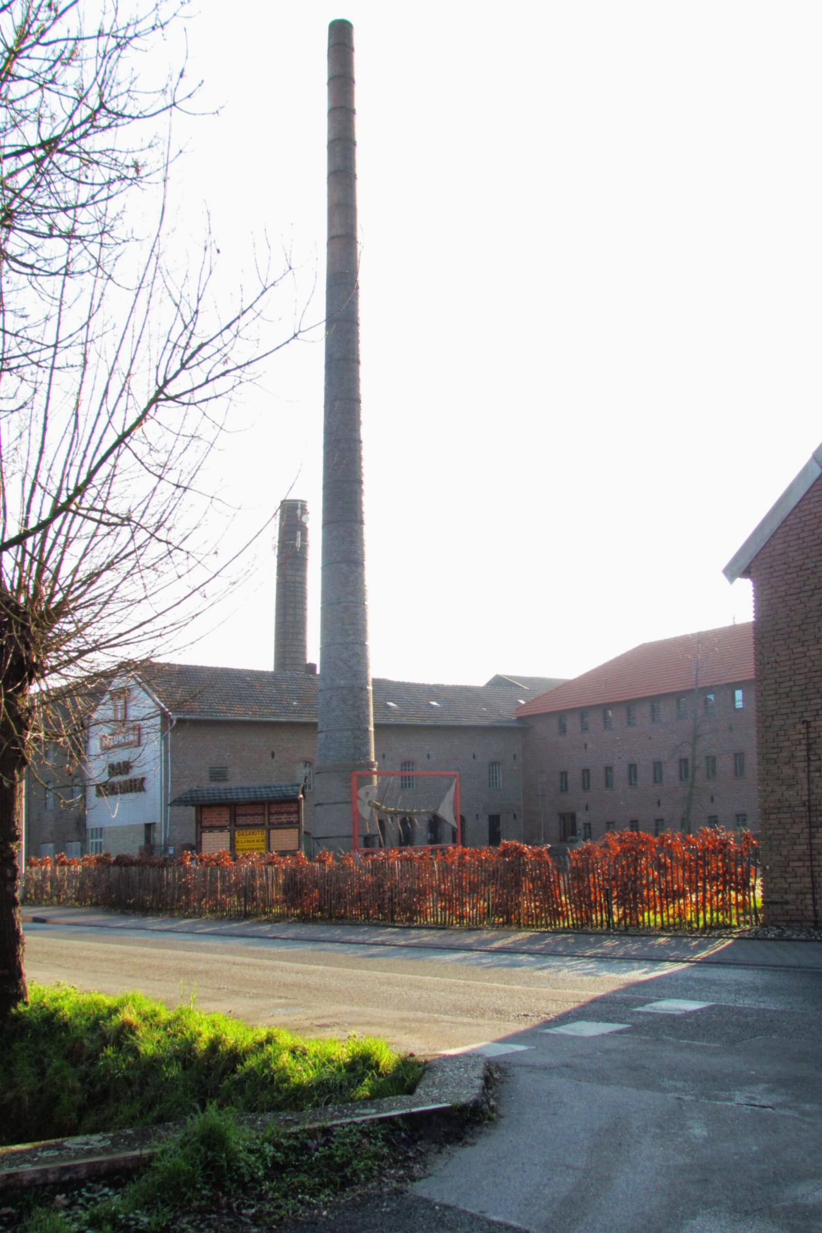 Alte Erinnerung in Gillrath